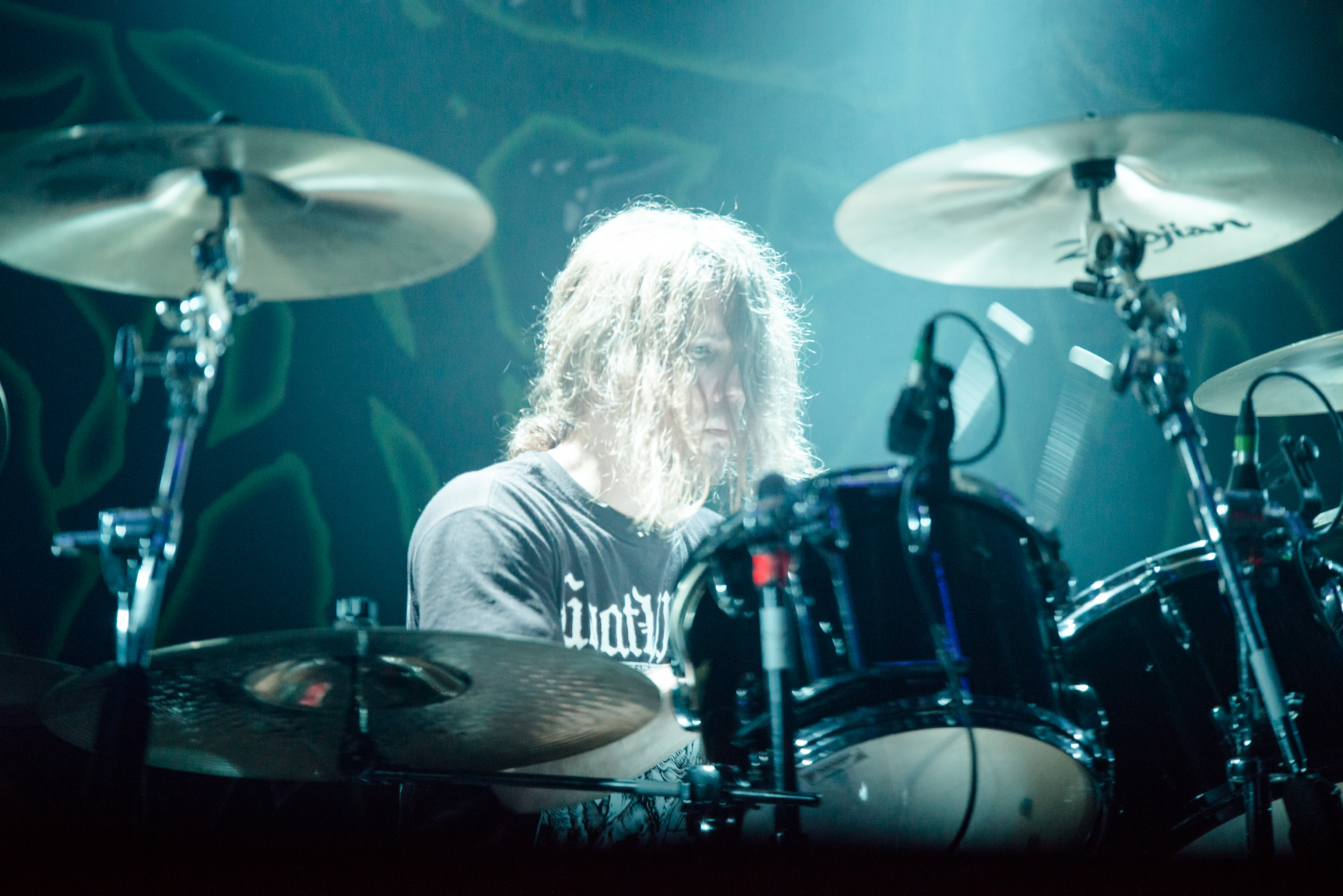 de